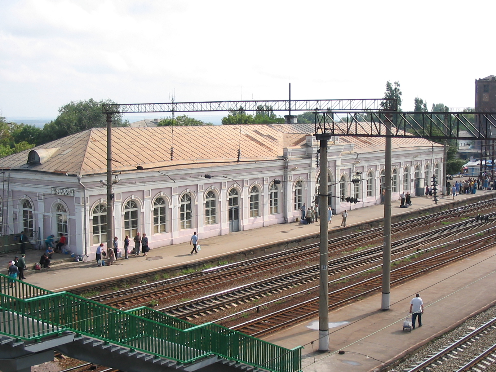 Вокзал на ст. Чертково. Вид с переходного мостика (направление - в сторону Миллерово)